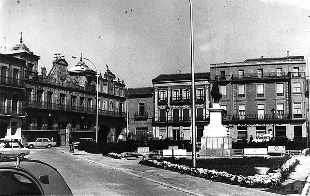 Plaza Mayor - Medina del Campo (Valladolid) - Plaza Mayor con Casa Consistorial y busto de la Reina Isabel la Católica a la derecha. - Fotografía. Papel 119 x 76 B/N